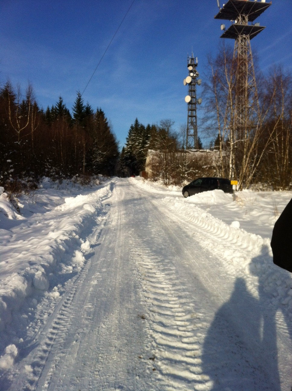 Wirtschaftsweg in Richtung Gipfel (07.02.2015)